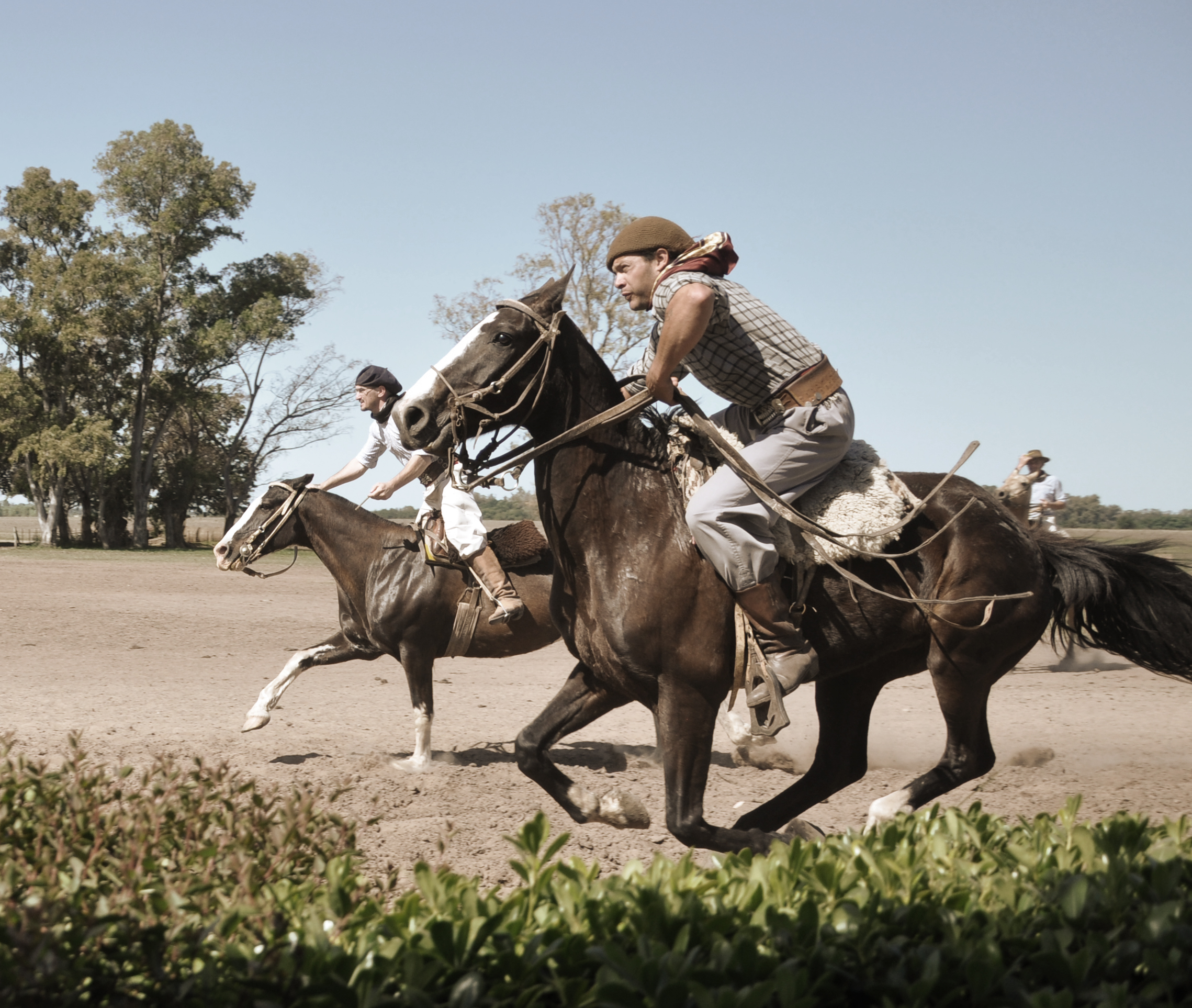 Gauchos in a rodeo at Estancia Santa Susana in Argentina.